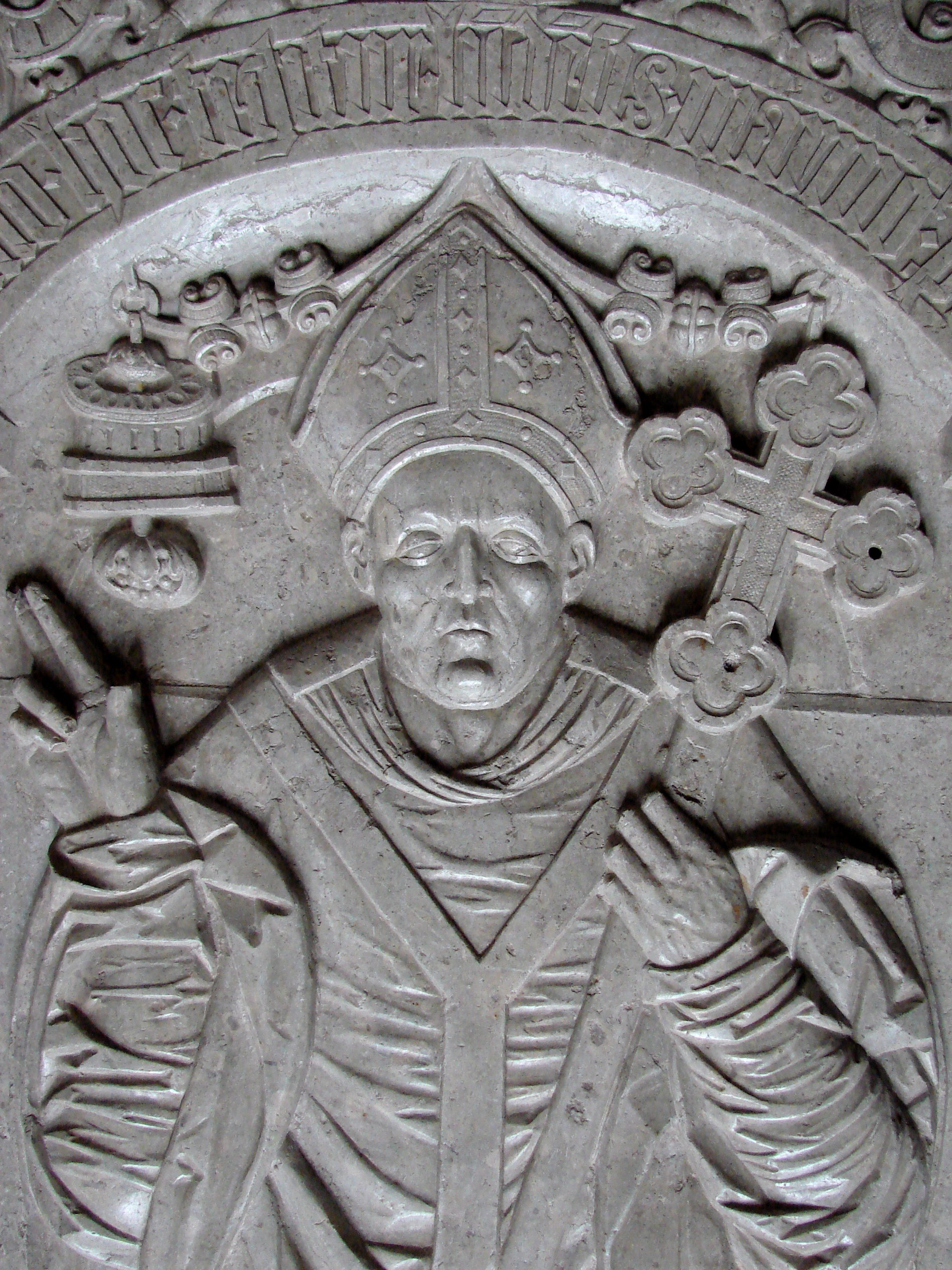 Detalje fra biskop Absalons ligsten, Sorø Klosterkirke, Sjælland